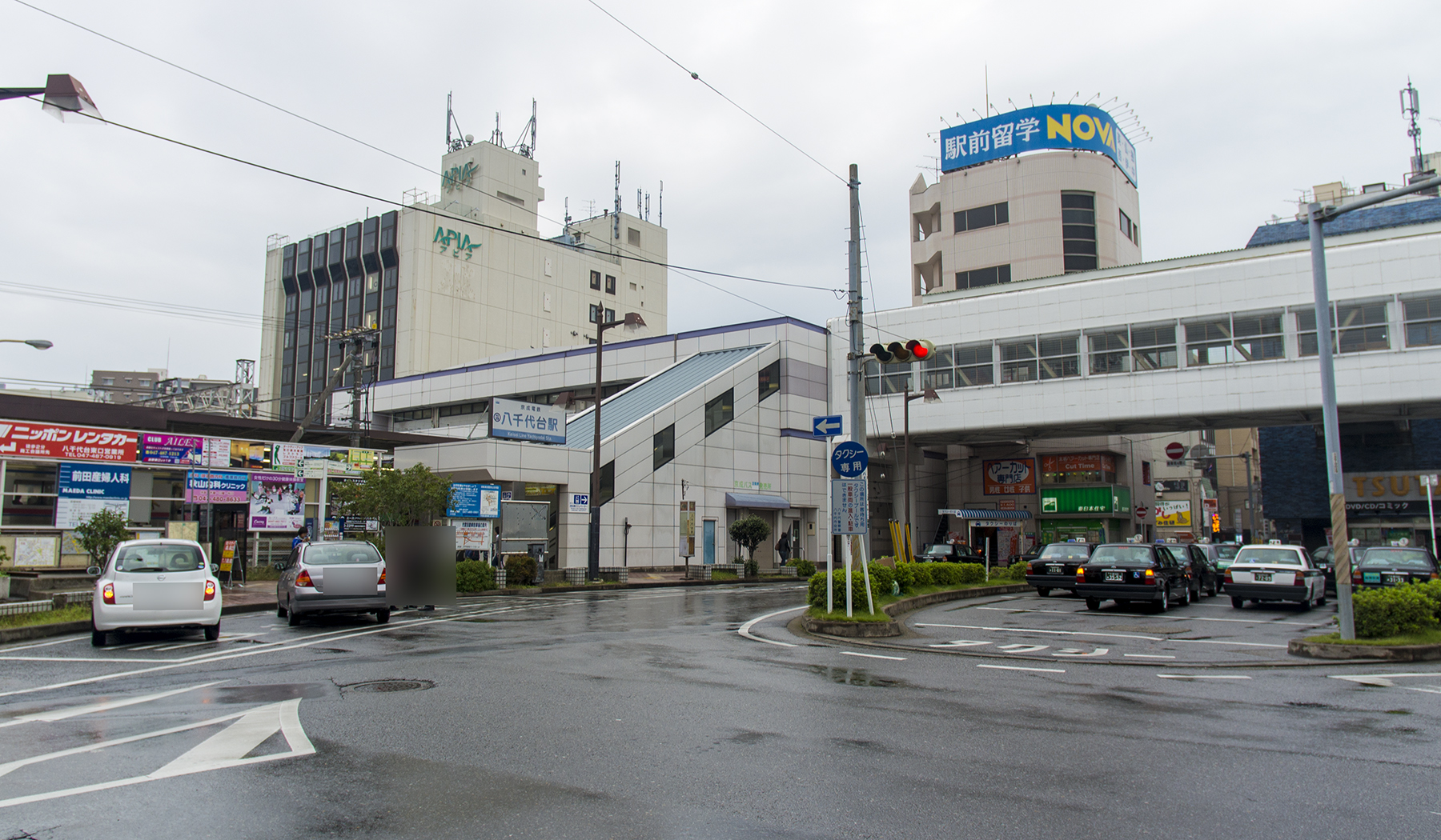 京成電鉄株式会社京成本線八千代台駅